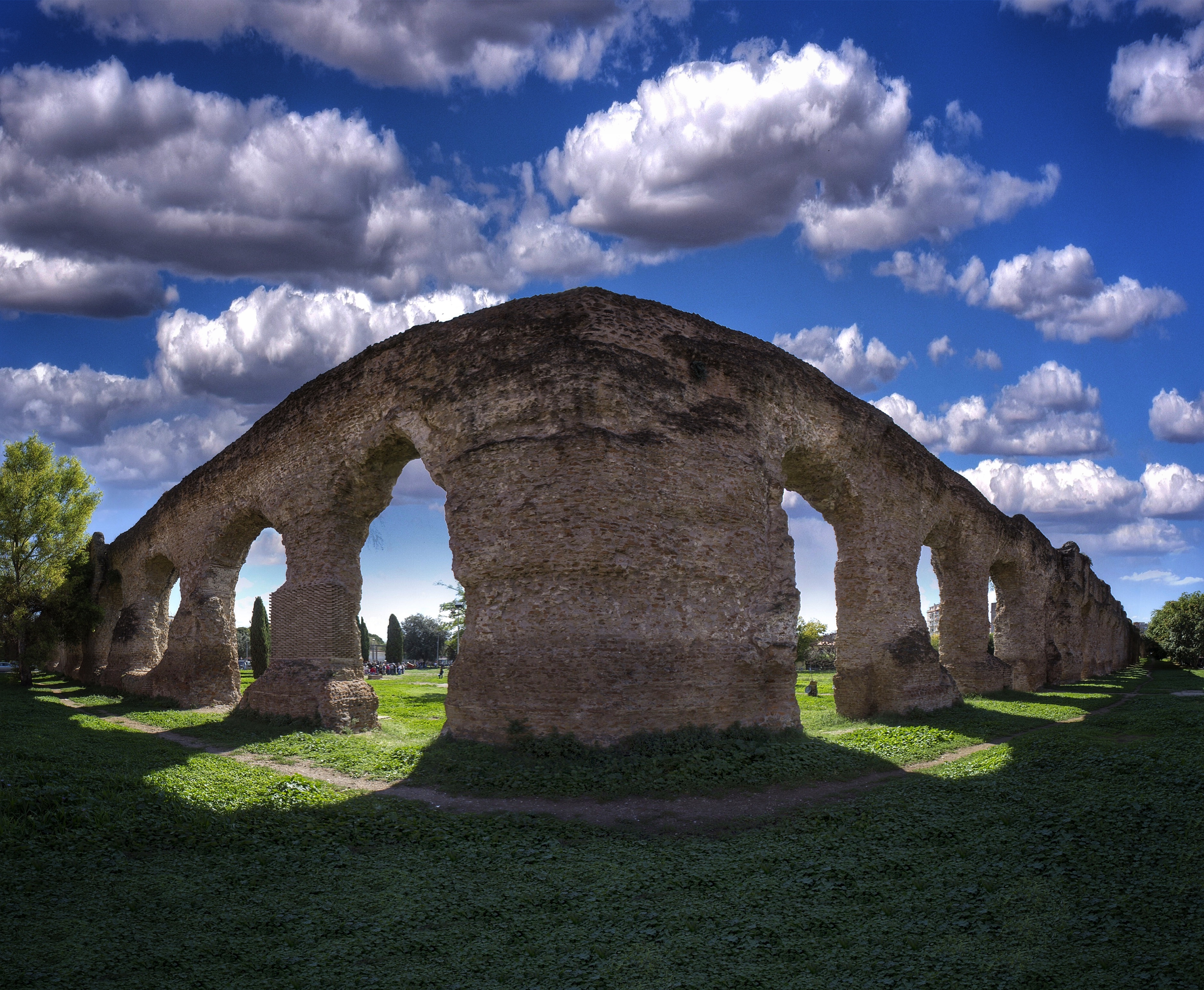 Acquedotto Alessandrino This is a photo of a monument which is part of cultural heritage of Italy.